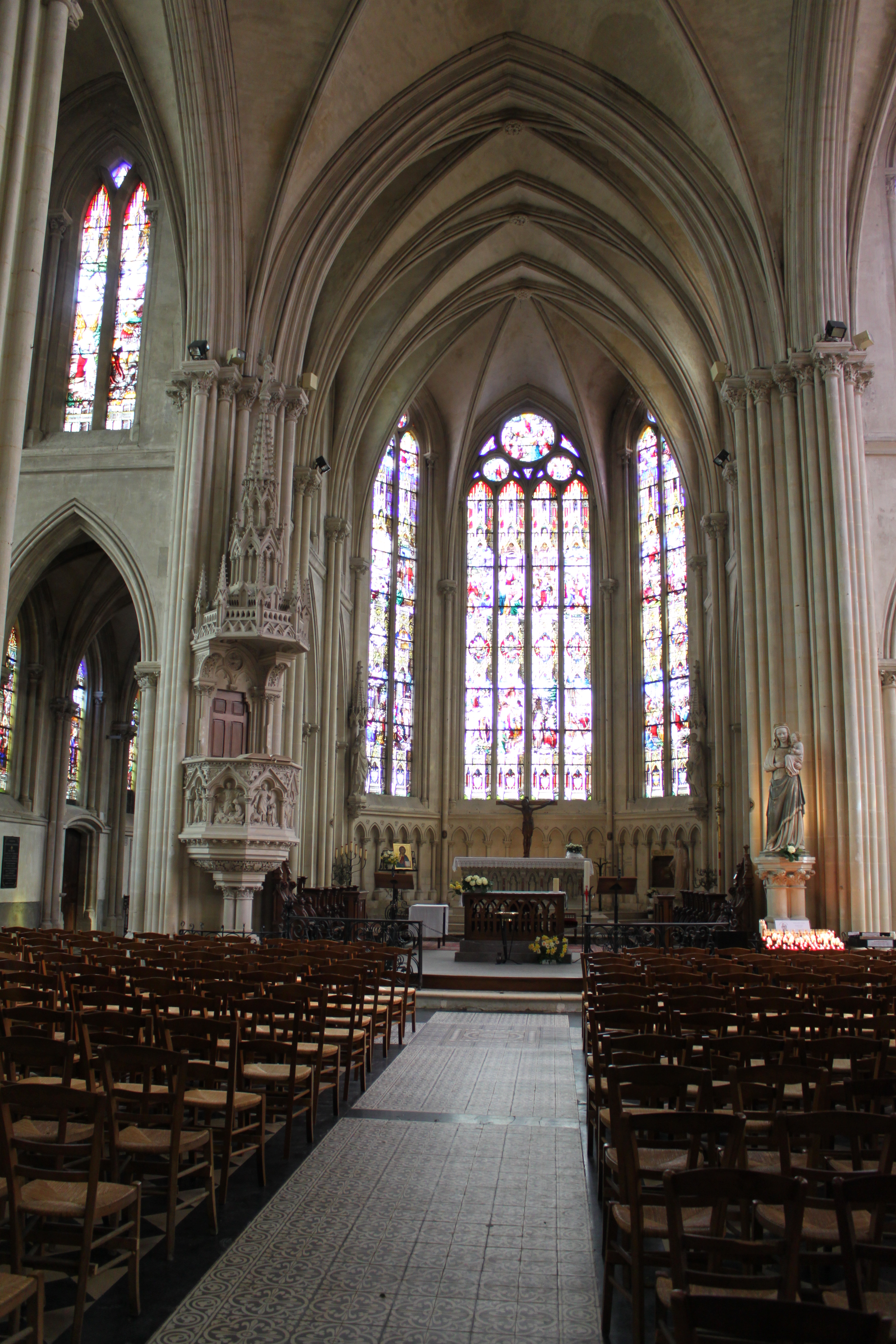 Vue intérieure de l'église Saint Martin